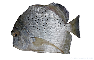 chand fish